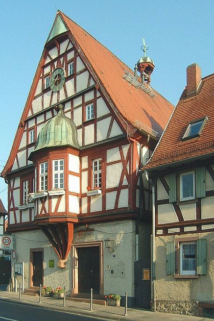 Rathaus in Seckbach, genutzt als Rathaus vor der Eingemeindung im Jahr 1900, errichtet Mitte 16. Jahrhundert, Stadtteil von Frankfurt am Main.